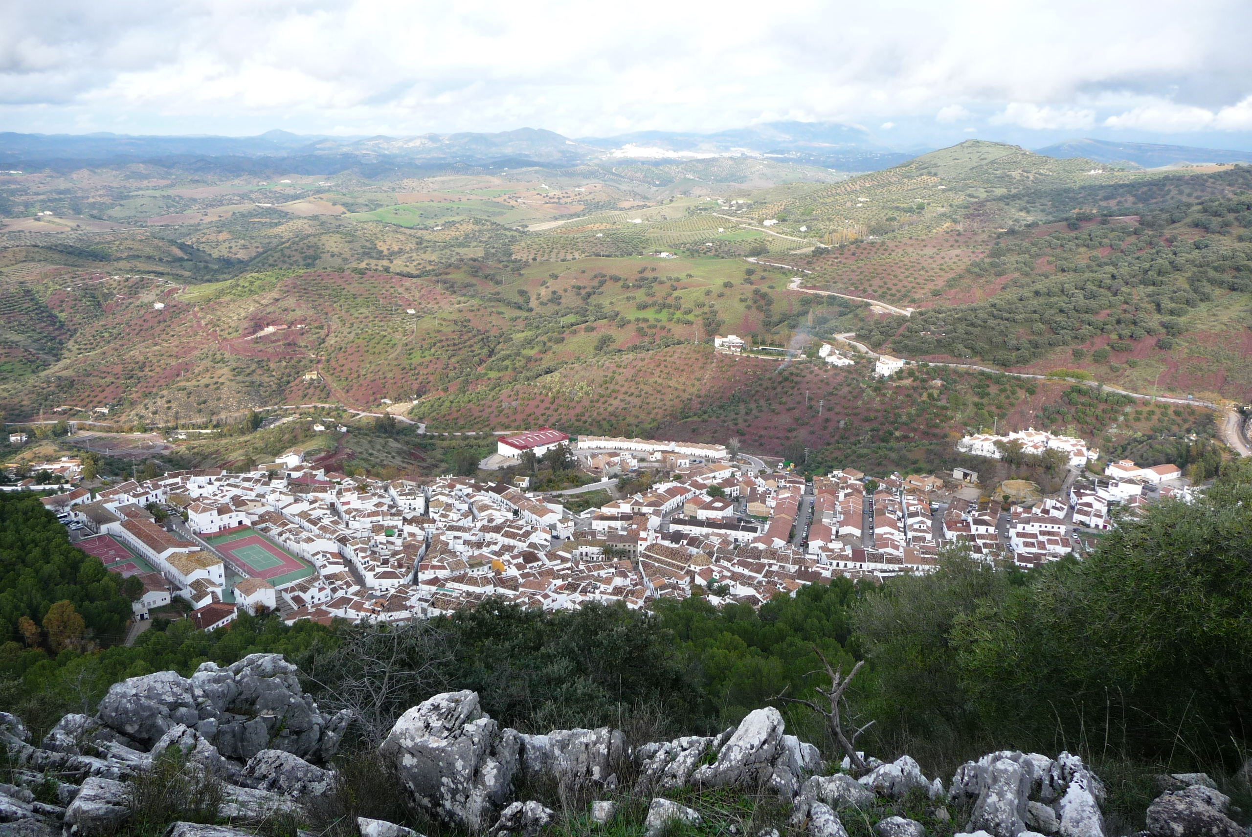 El Gastor (Andalusia, Spain).